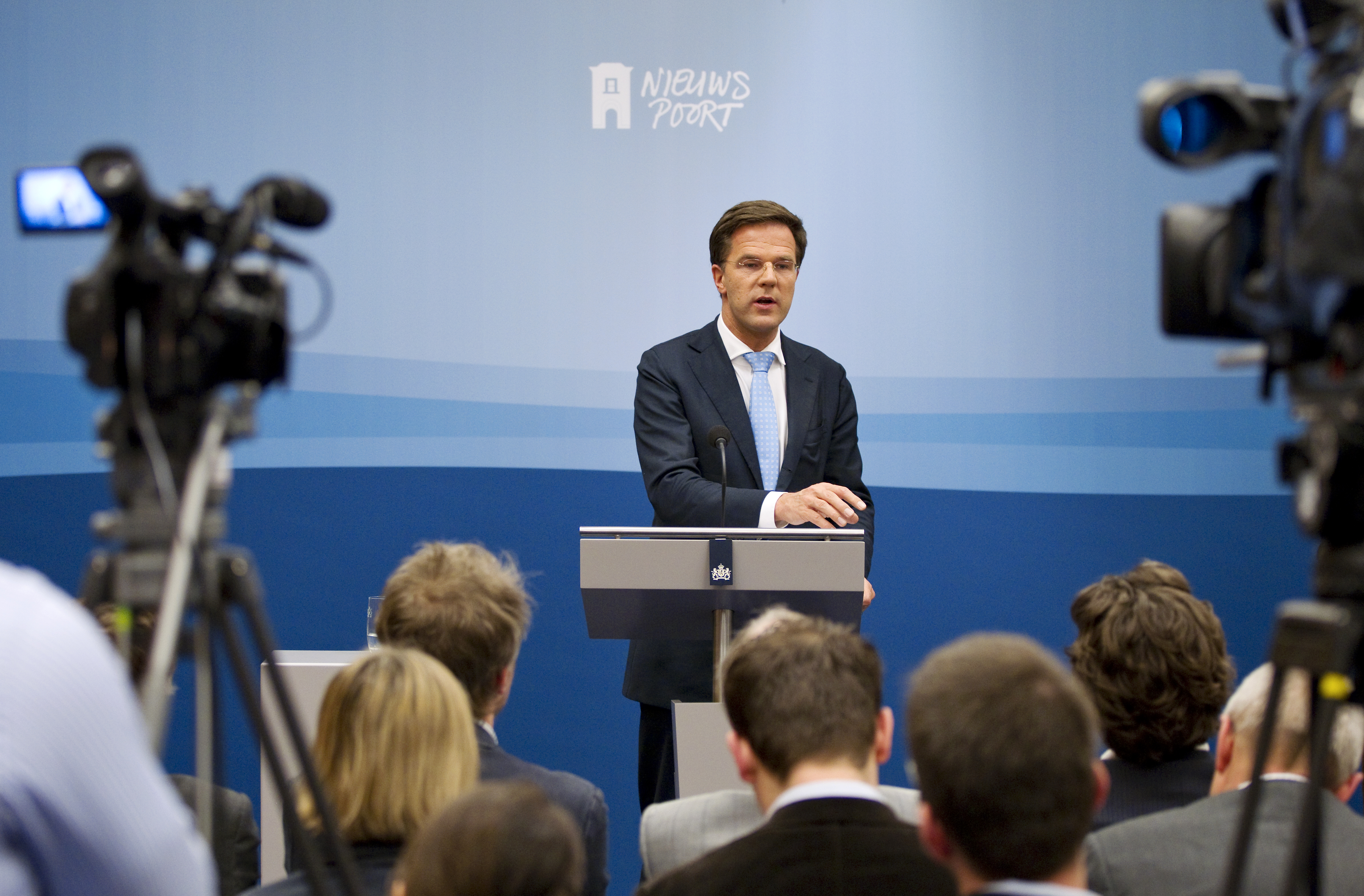 Na afloop van de ministerraad geeft de minister-president antwoord op vragen van journalisten.